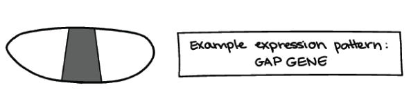 Gap